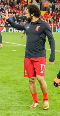 Mohamed Salah, Ragnar Klavan